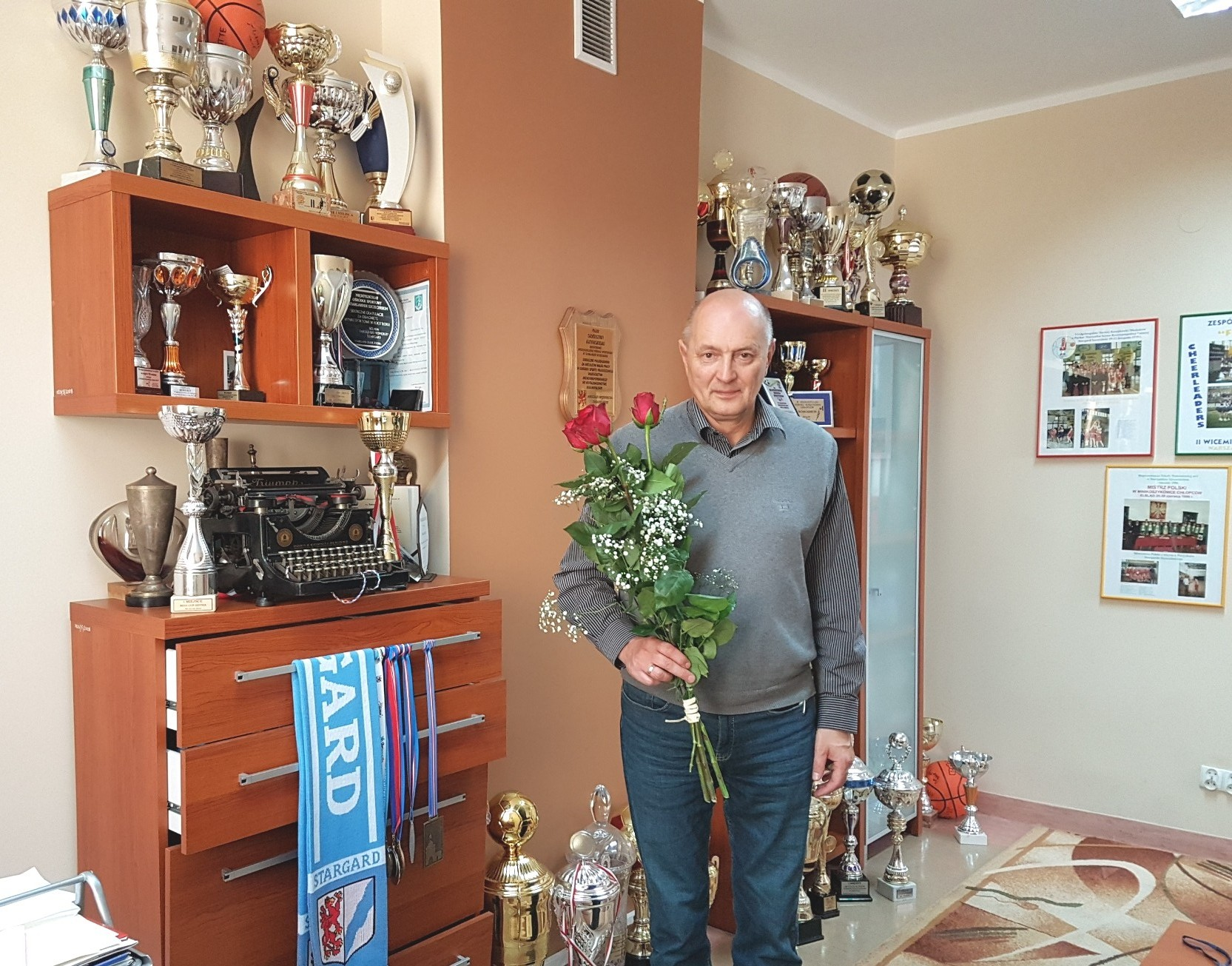 Tadeusz Gutowski (16.10.2018)